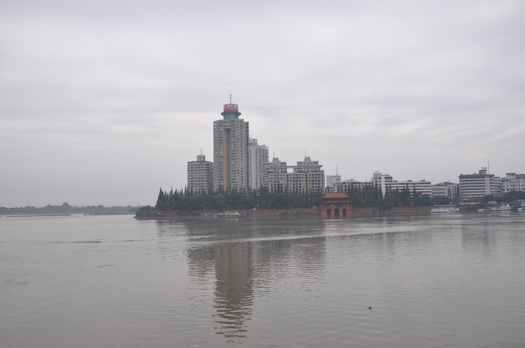 凌云路江堤隔江看乐山城区